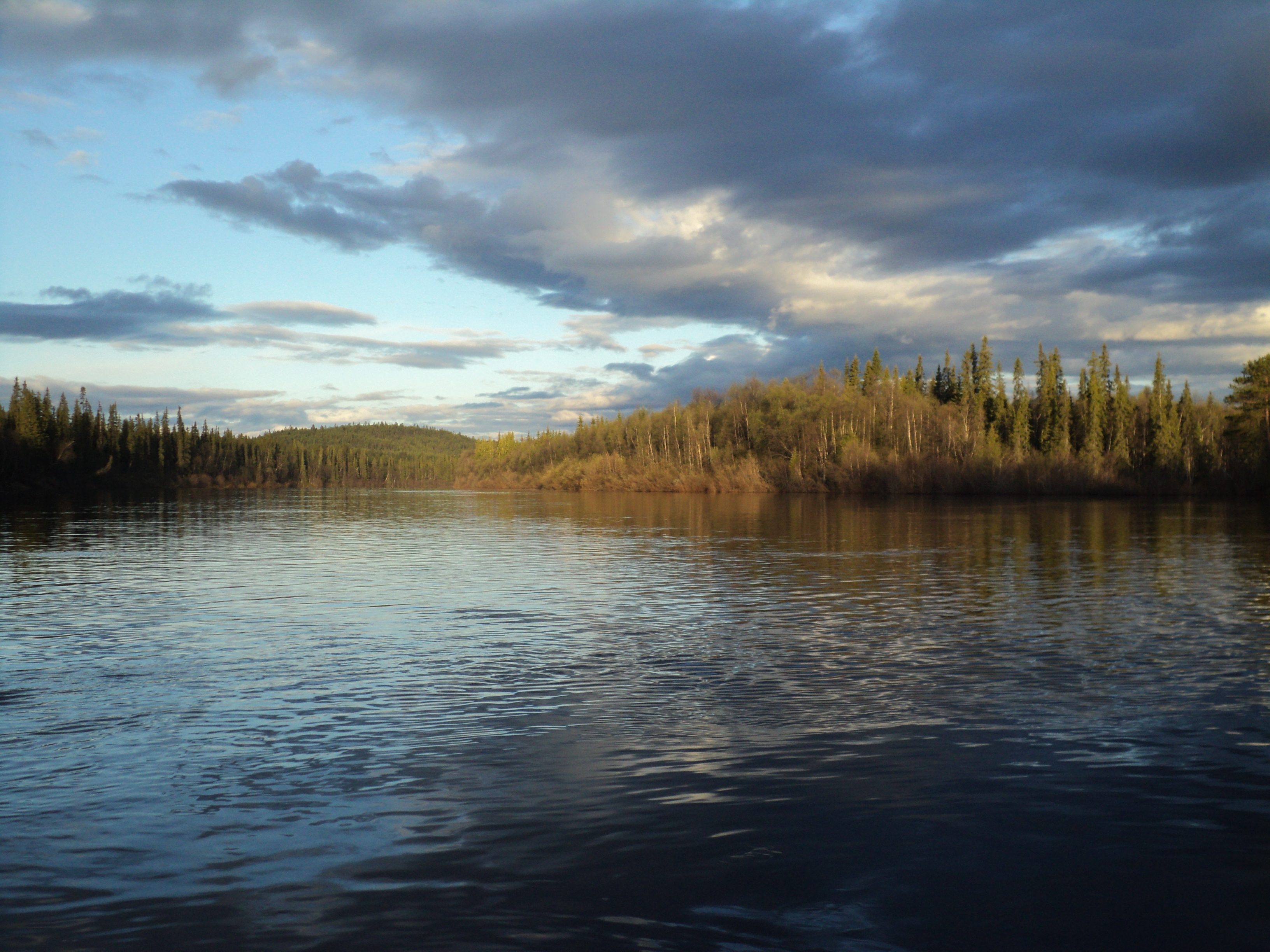 Река Лотта в мае 2011